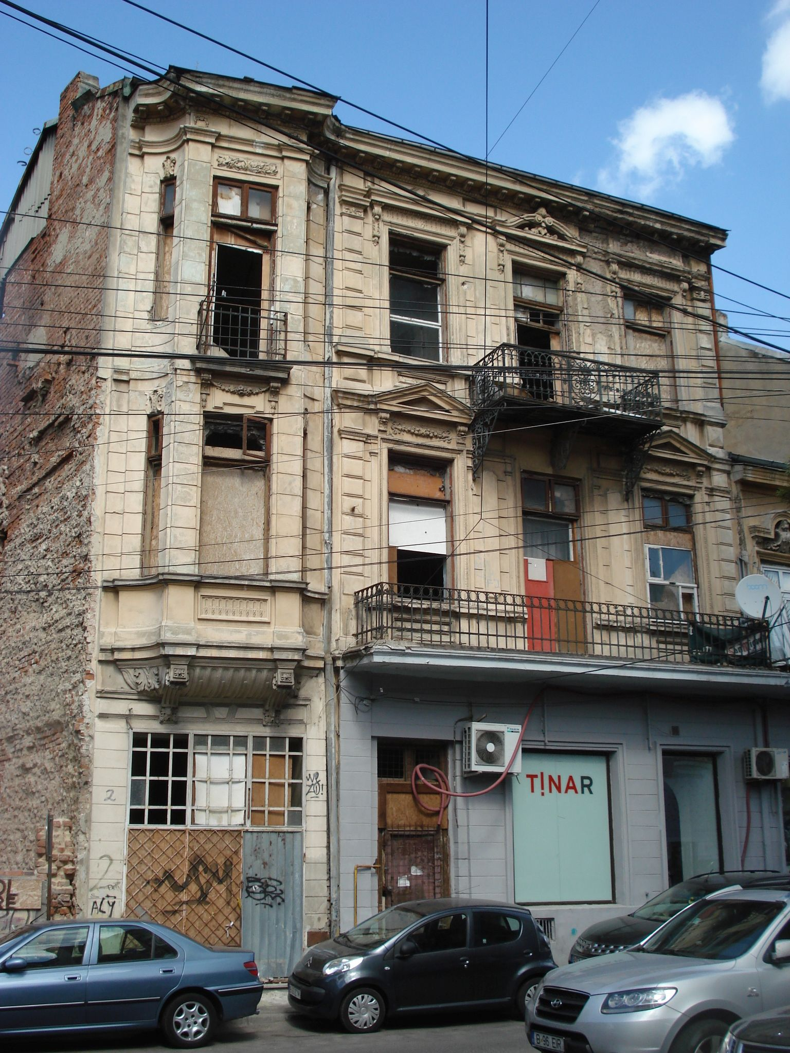 Casă pe strada Blănari la nr. 2